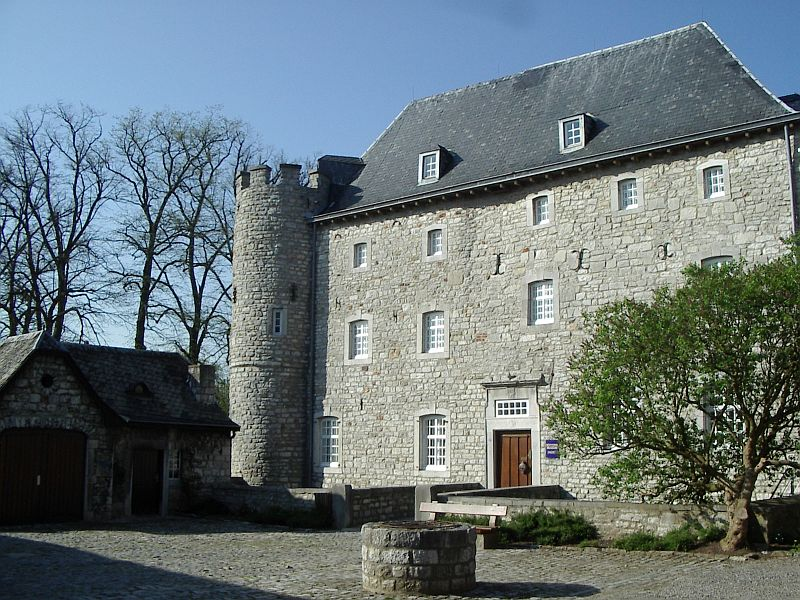 Beschreibung: Eingang zum Töpereimuseum in Raeren (Burg Raeren) Quelle: erstellt am 22.04.2005 Fotograf oder Zeichner(in): Marie-Luise Carl